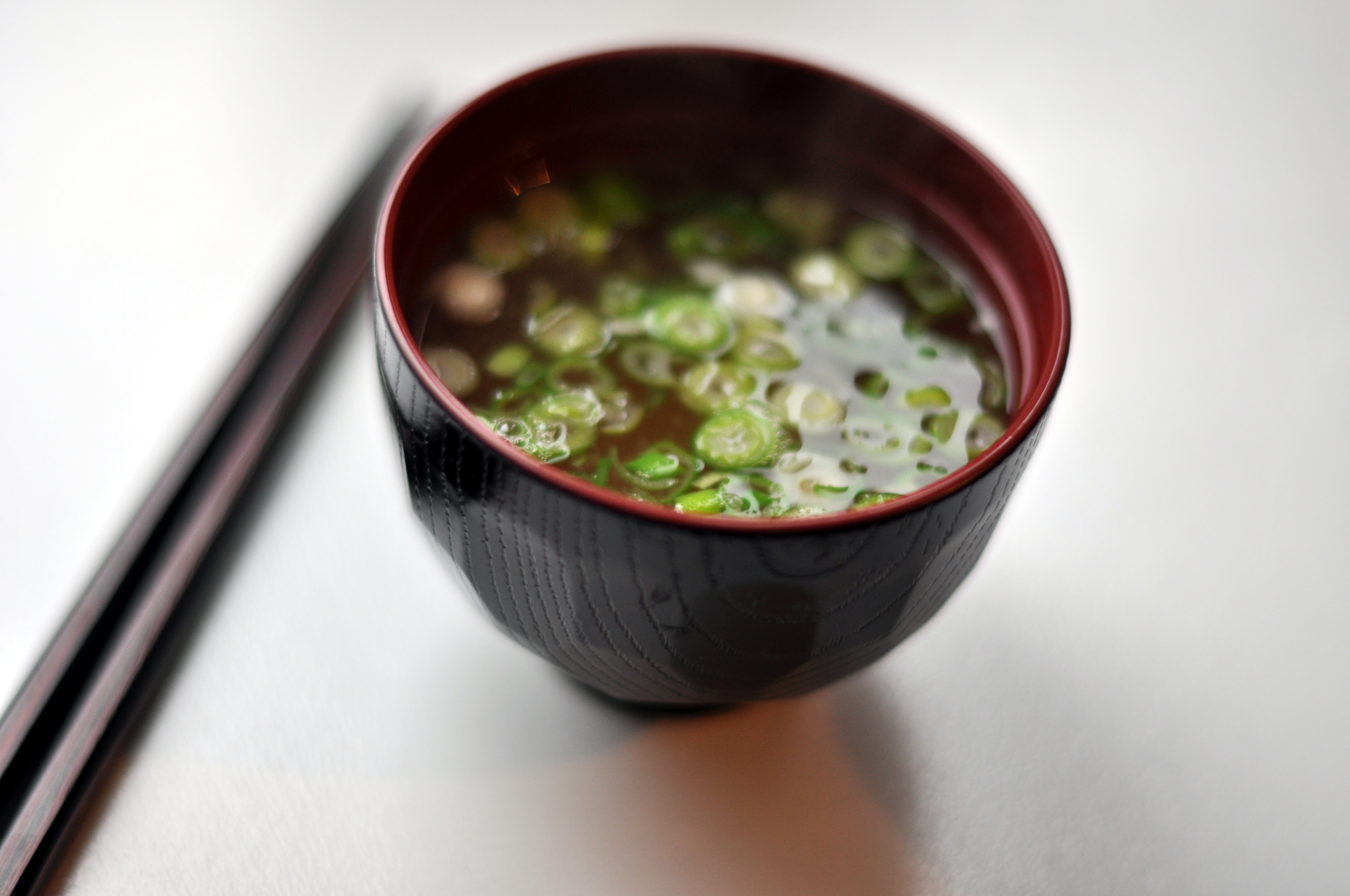 Miso-suppe